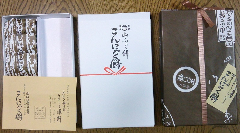 左から包装状態(店頭ではこの外観です) 包装を開いたところ、(山ふぐ餅の表示あり) 箱を開けたところ、(本当はギッシリ入っていますが右半分は開けると同時に食べちゃった)